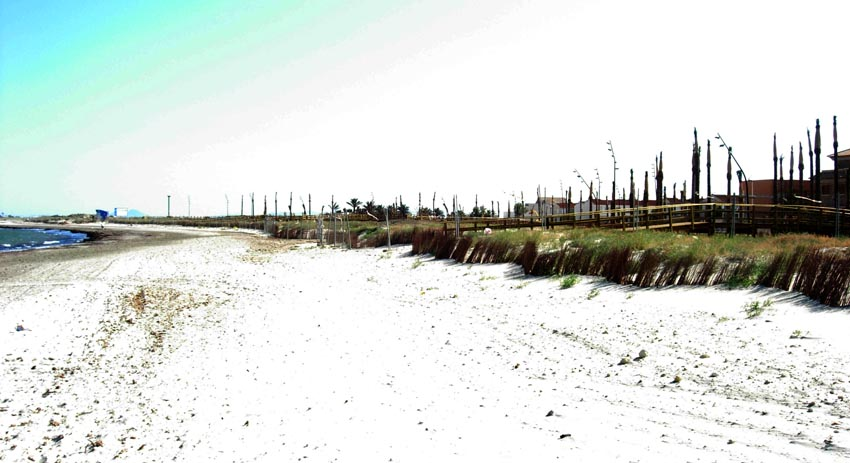 Vista de la playa